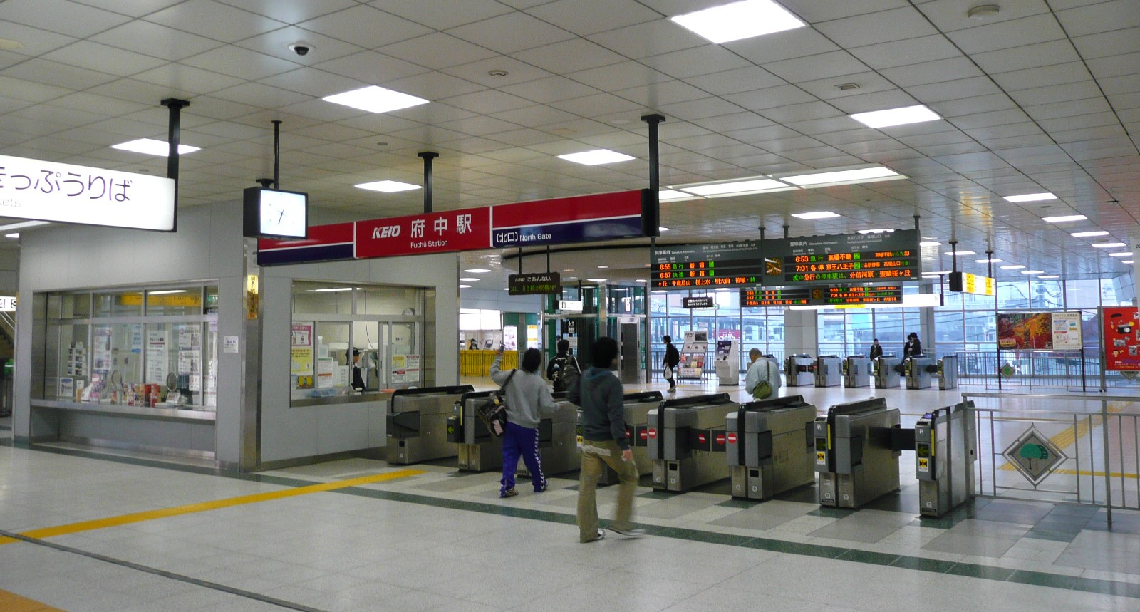 府中駅改札口（北側）